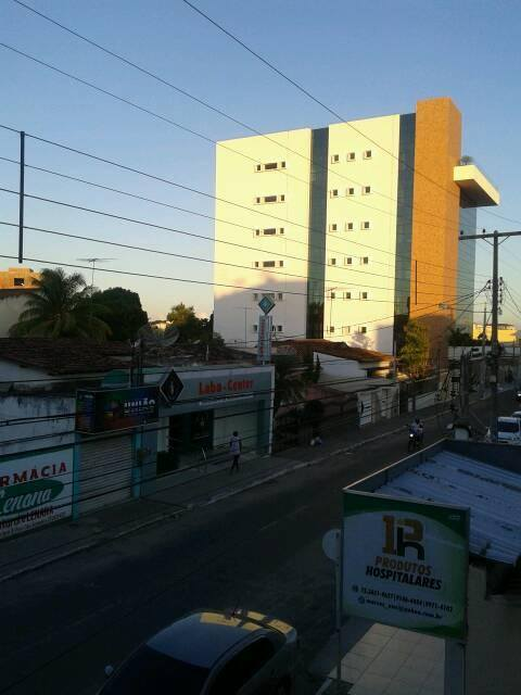 Rua no centro de SAJ